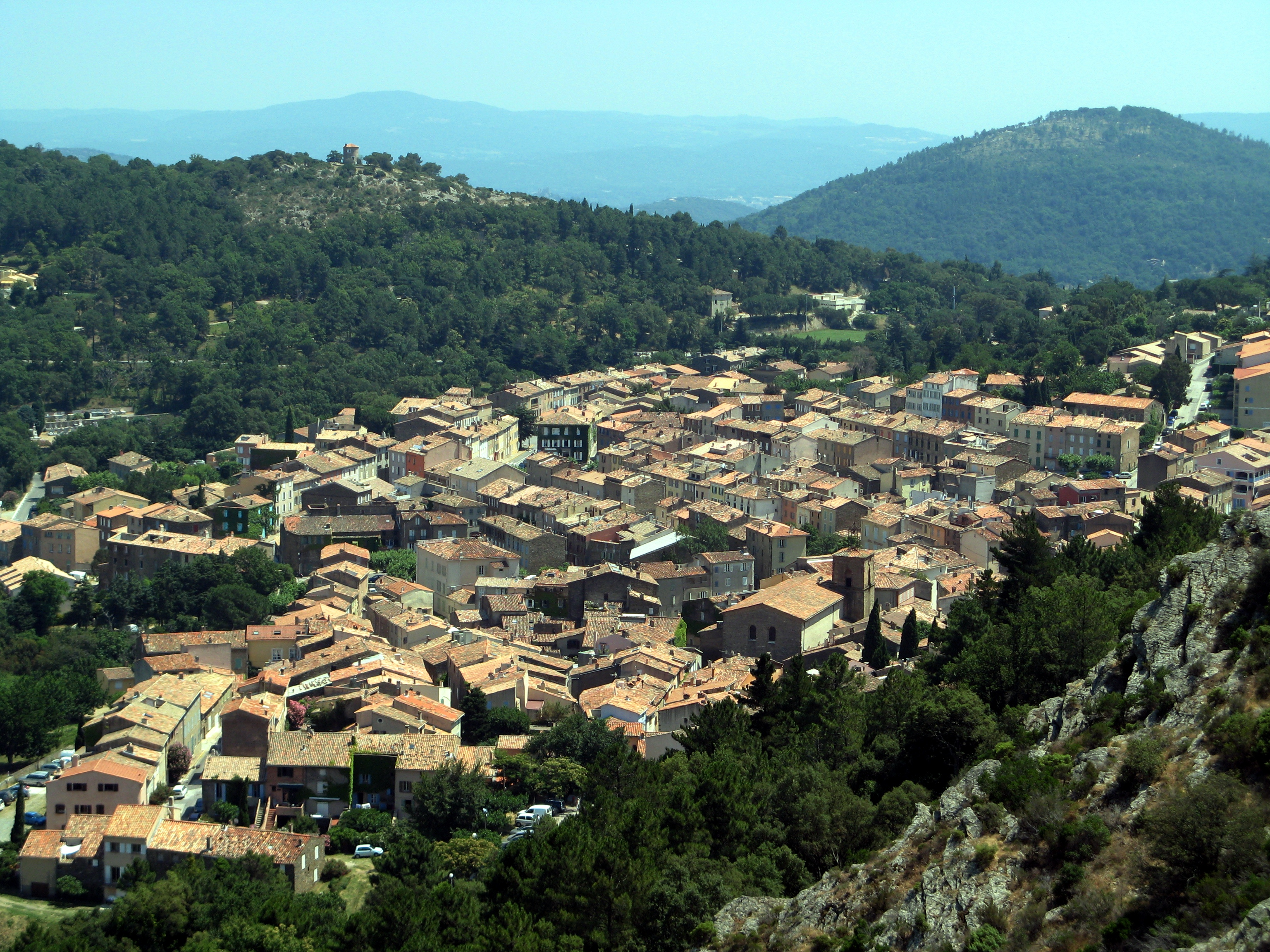 La Garde-Freinet (Var), vue générale de la ville depuis le fort.